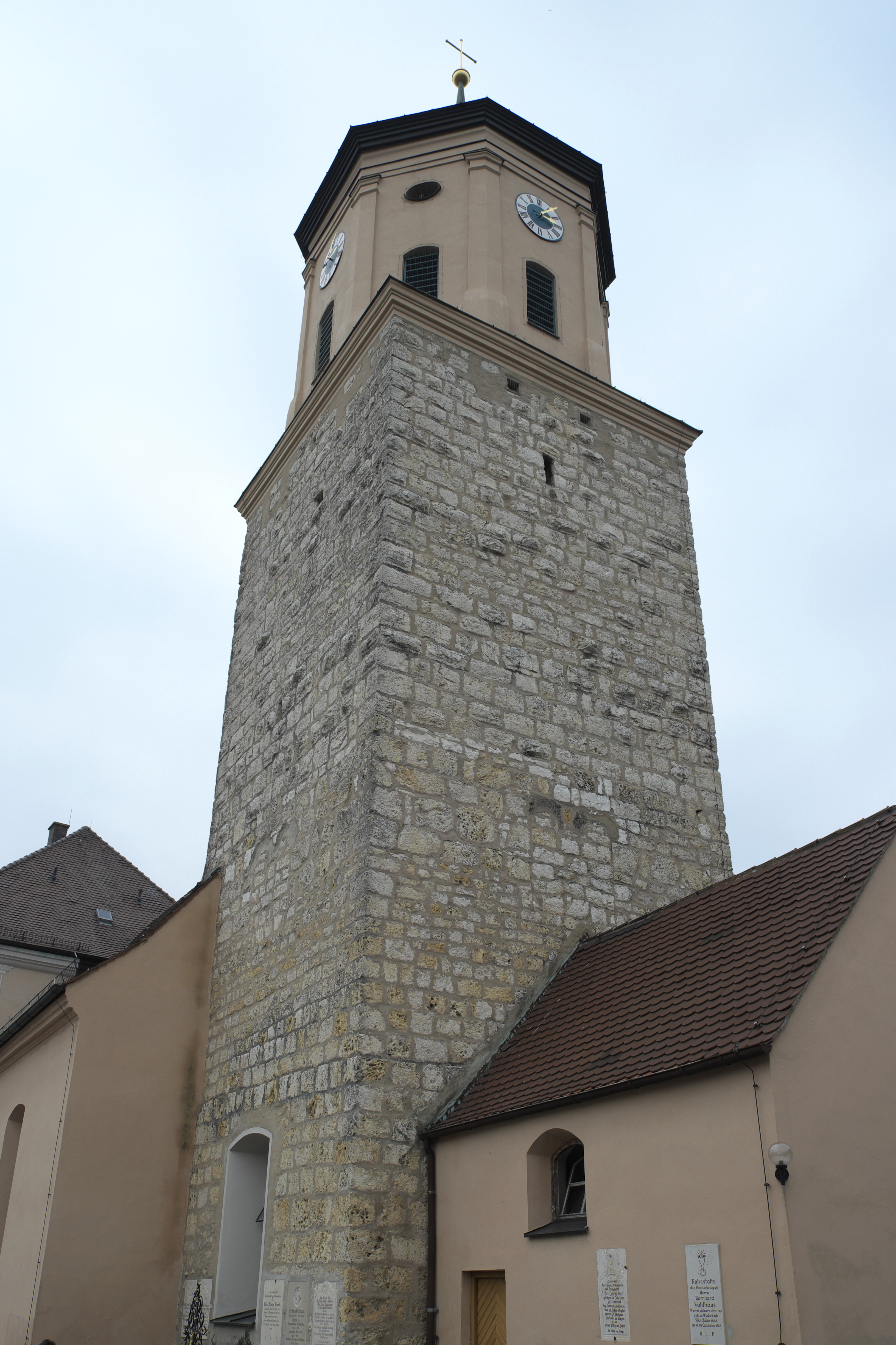 Katholische Pfarrkirche Mariä Geburt in Gosheim (Huisheim) im Landkreis Donau-Ries (Schwaben/Bayern), Kirchturm ehemals Bergfried der Burg Gosheim, Unterbau von 1250